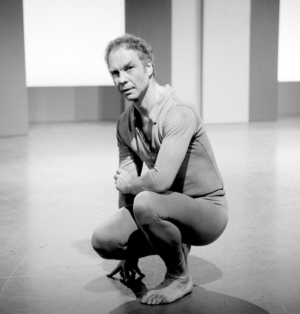 R.I.P